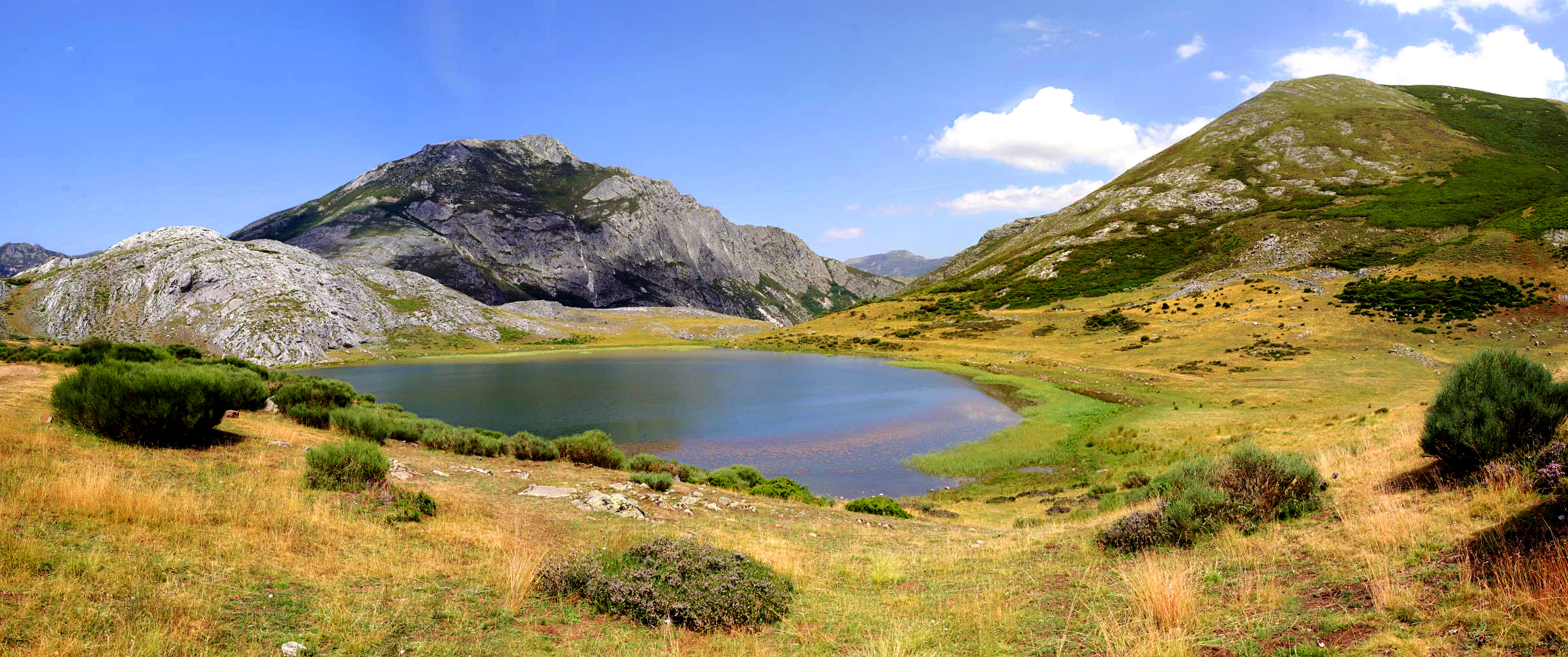 Lago Isoba. Alto Porma, León, País Leonés.